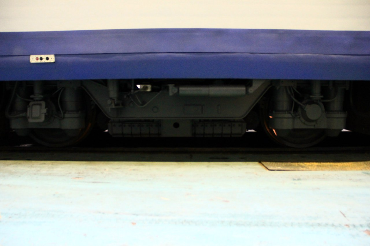 ЭС250 "Сокол"(тележка).